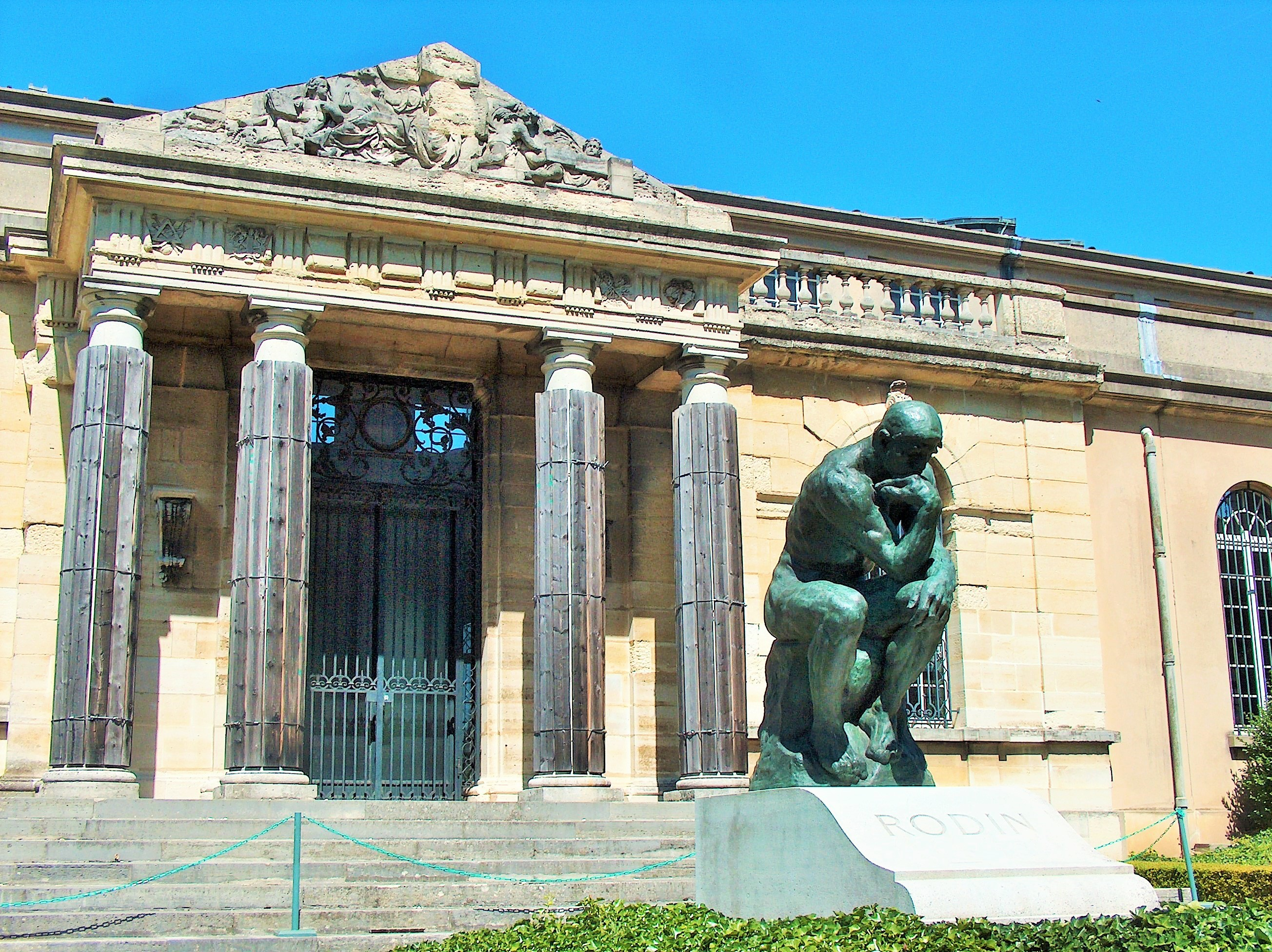 tombe de Rodin avec le Penseur au dessus, musée Rodin de Meudon